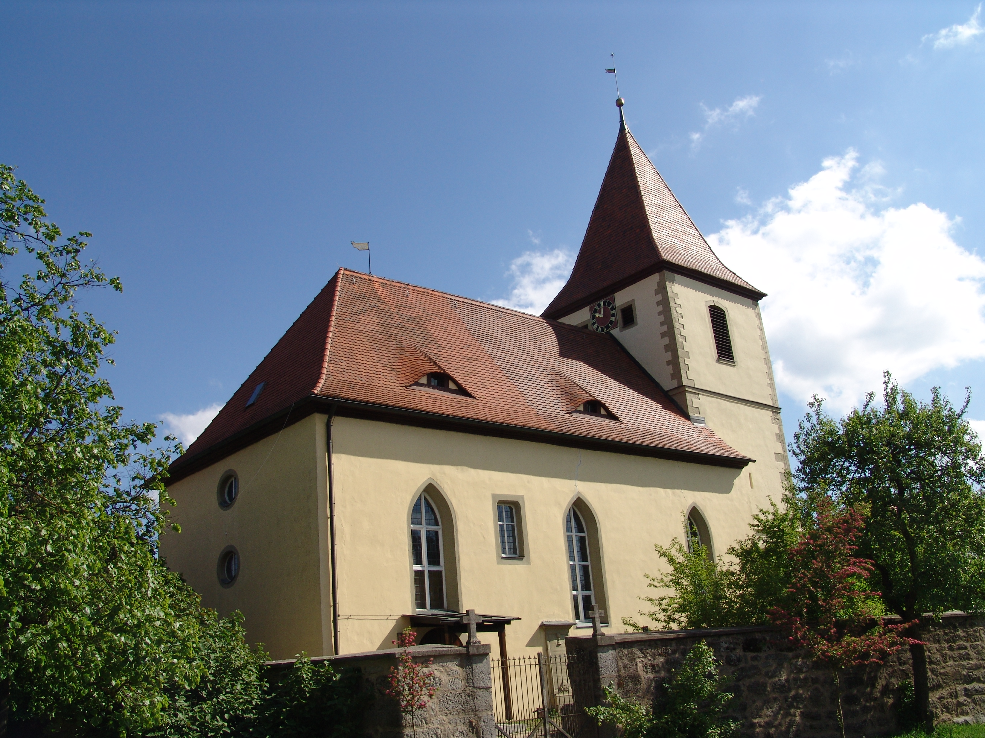 evang.-luth Kirche St. Martin in Wörnitz